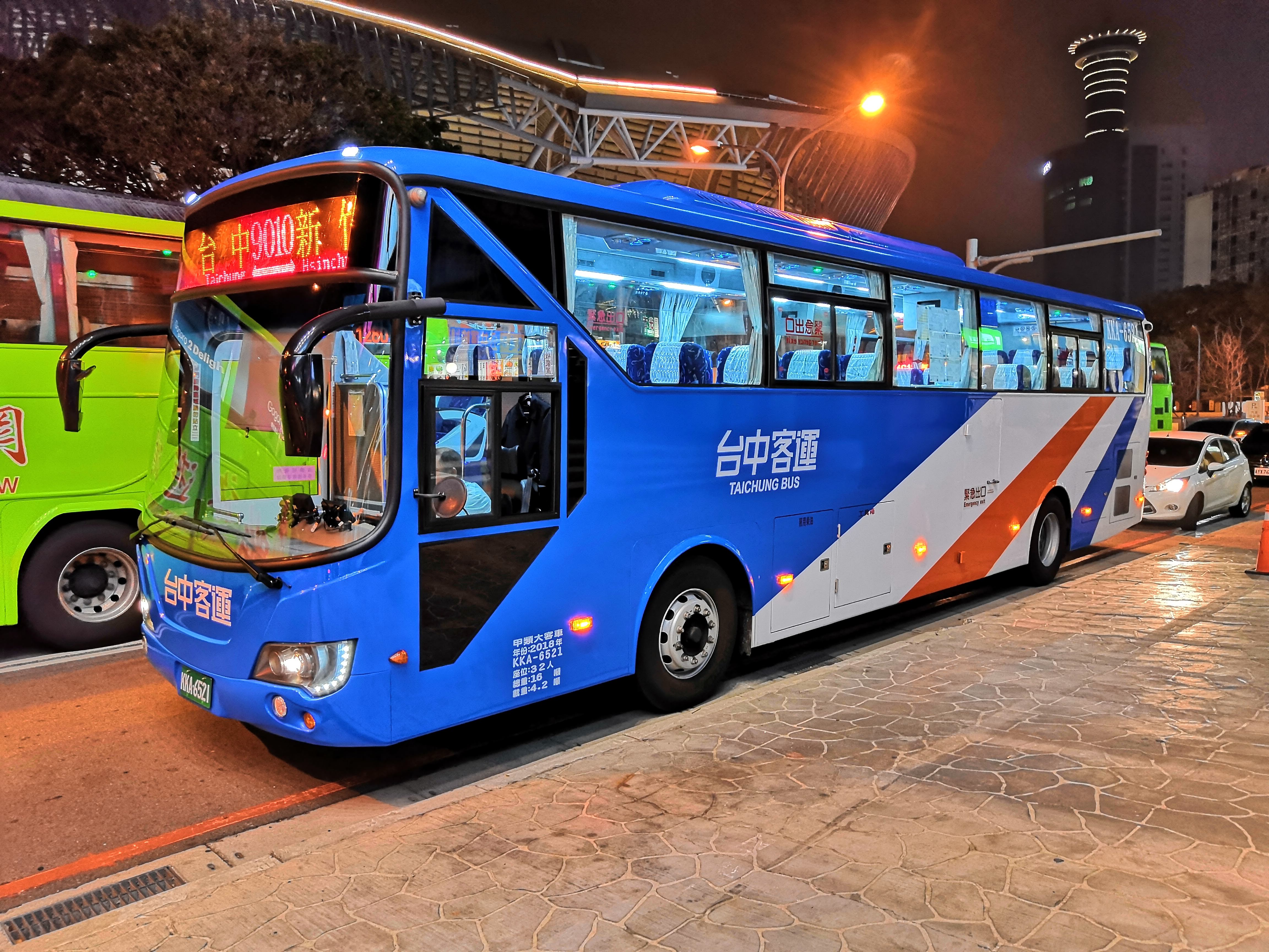 臺中客運 9010路 HINO RM8JSVU-SSF(馨盛) 大客車 KKA6521